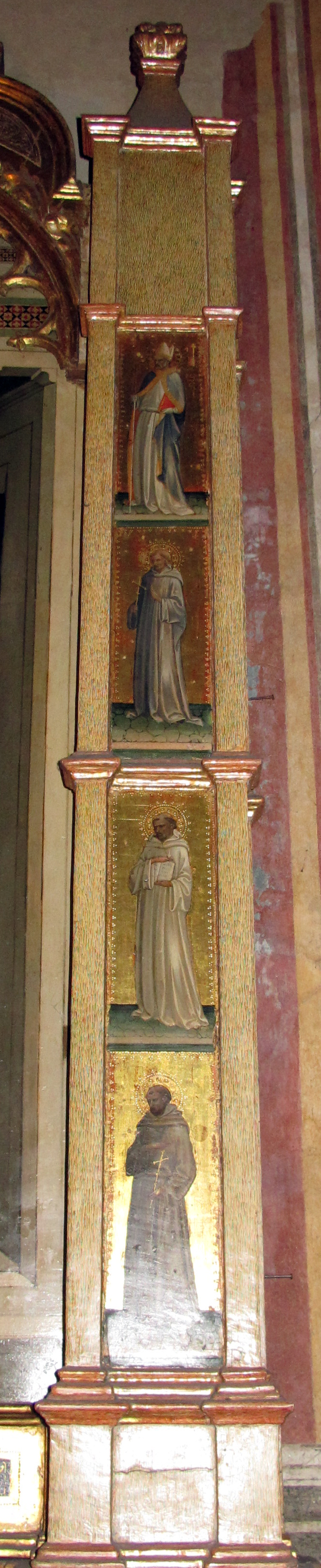 Cappella Bartolini Salimbeni, Firenze